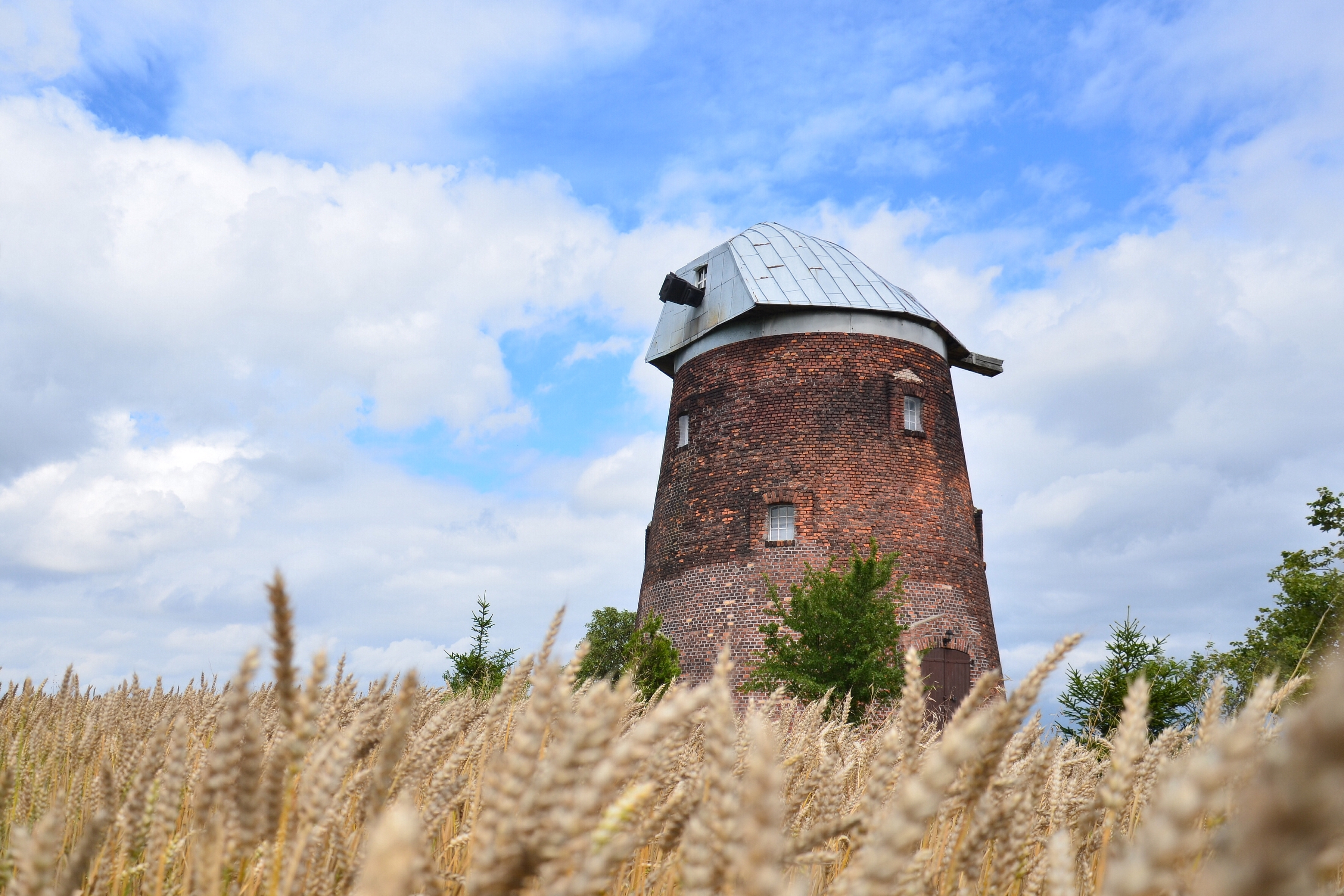 Radzyń-Wybudowanie, wiatrak holender, kon. XIX